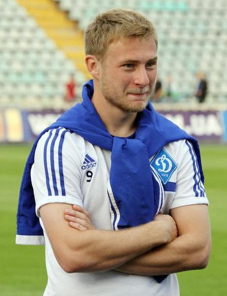 Роман Безус - український футболіст під час виступів за Динамо на фіналі Кубку України